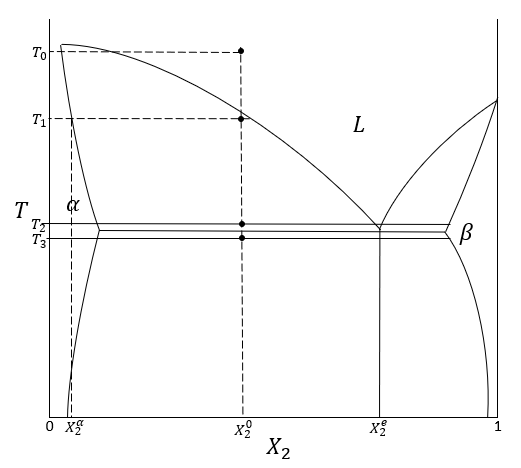 Hypoeutektisen koostumuksen mikrorakenteen muuttuminen jähmettymisessä eutektisessa systeemissä